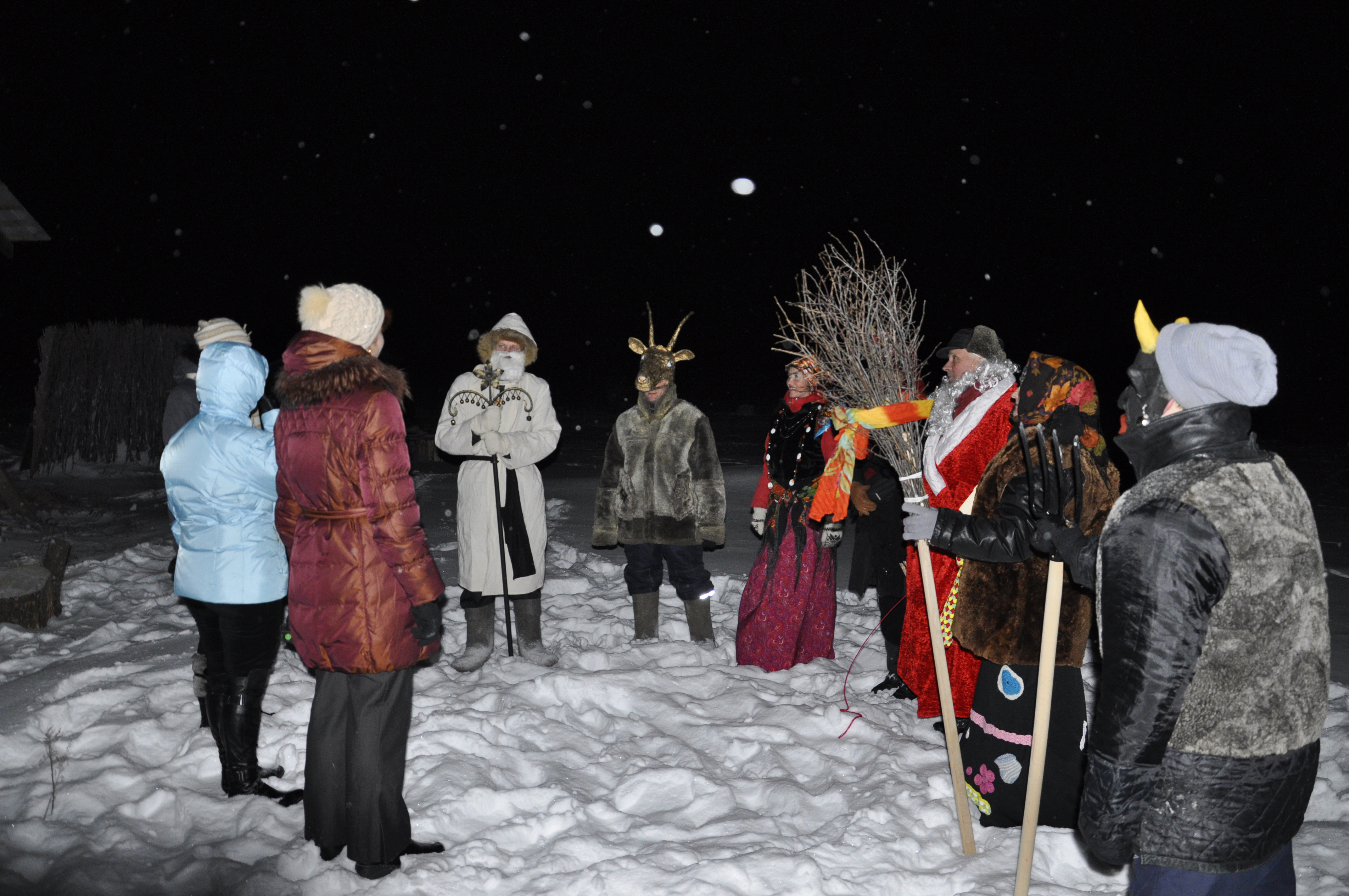 Колядки в родовом экопоселениии «Кореньские родники». Белгородская область, Россия, декабрь 2012 г.